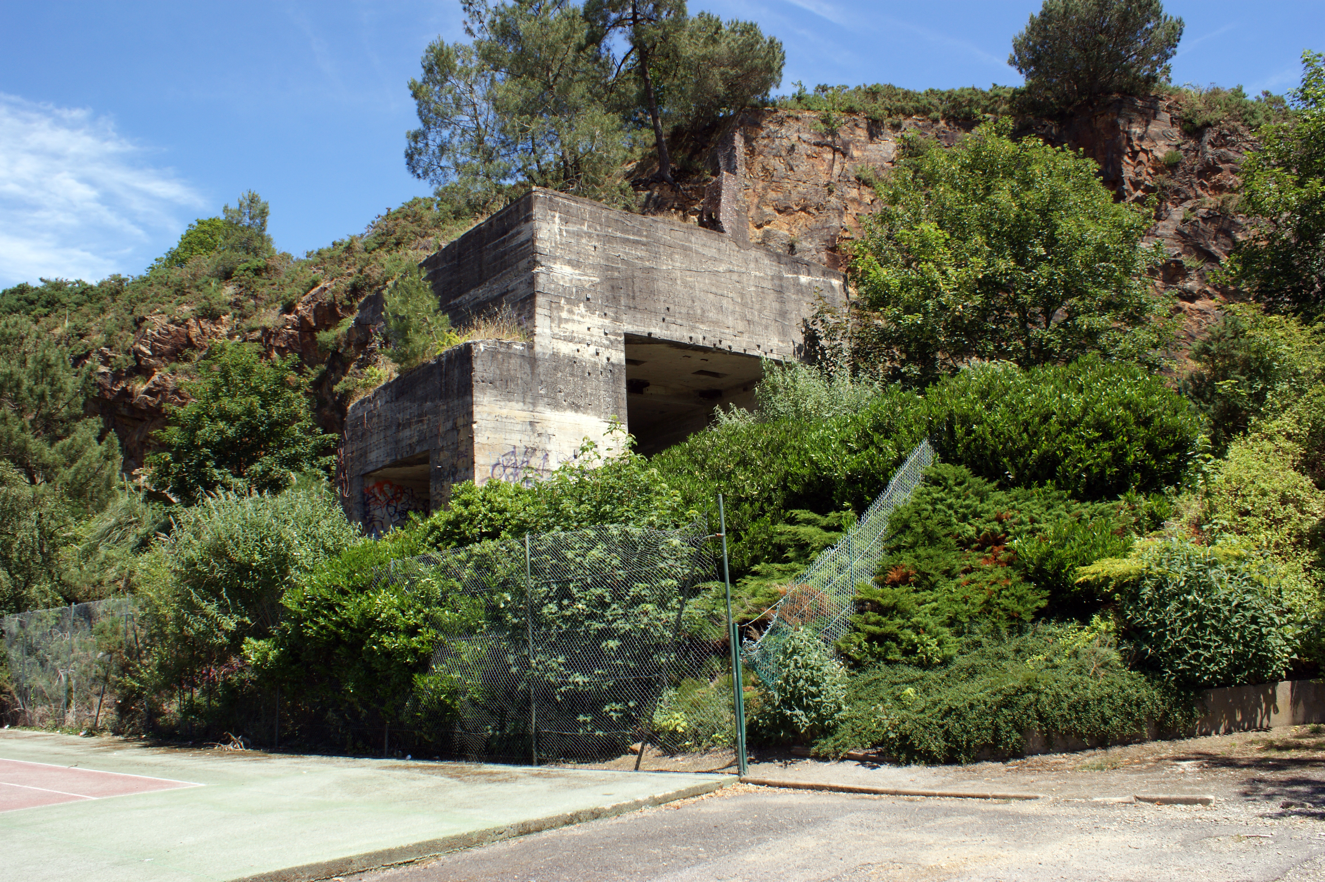 L'ancienne entrée fortifiée du tunnel abri pour un canon de 240 sur rail utilisé pendant l'existence de la poche de Saint-Nazaire. Il était relié par un embranchement à la ligne de Savenay.